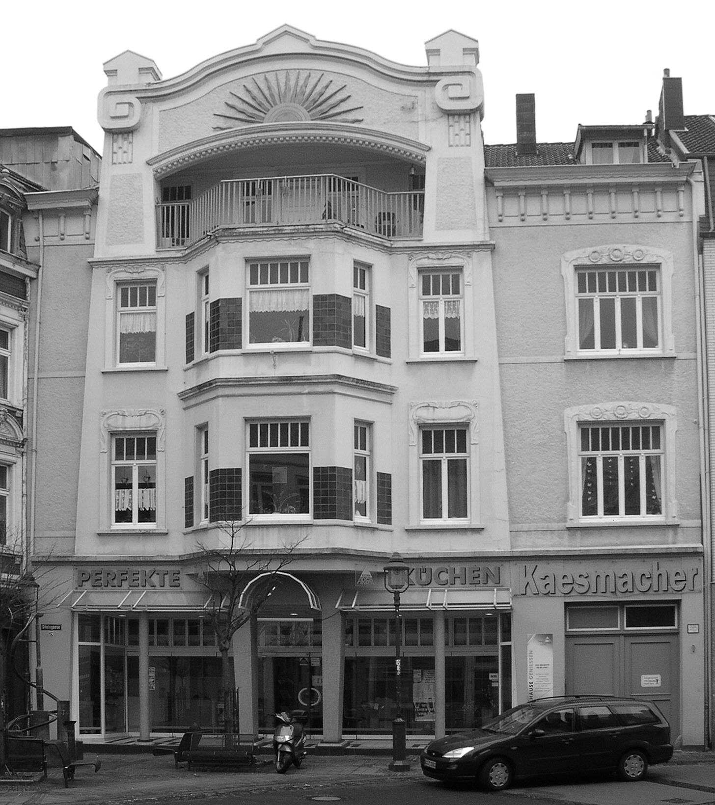 Stolberg, Jugendstilhaus (Möbel Kaesmacher)